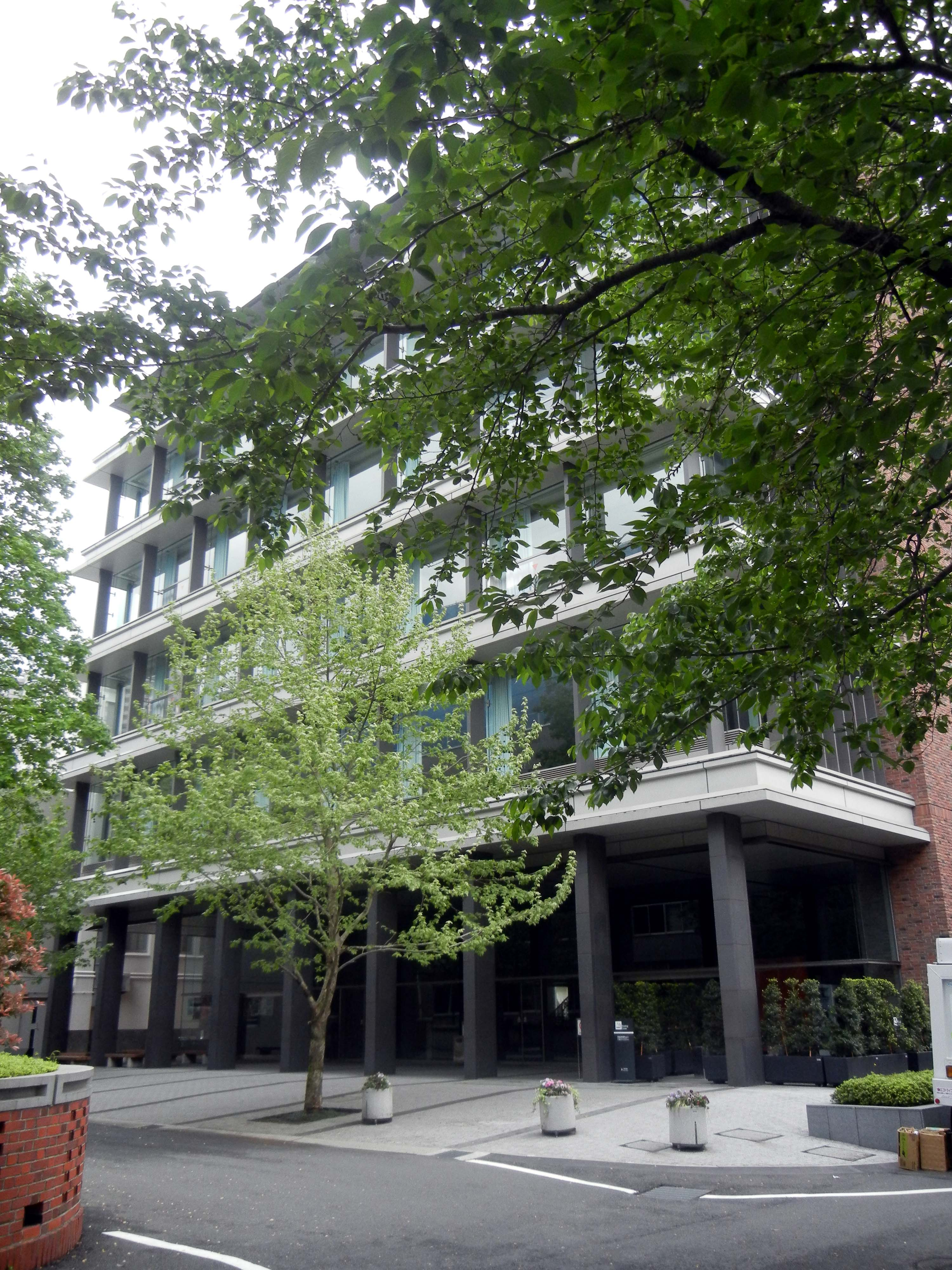 立教大学池袋キャンパス14号館